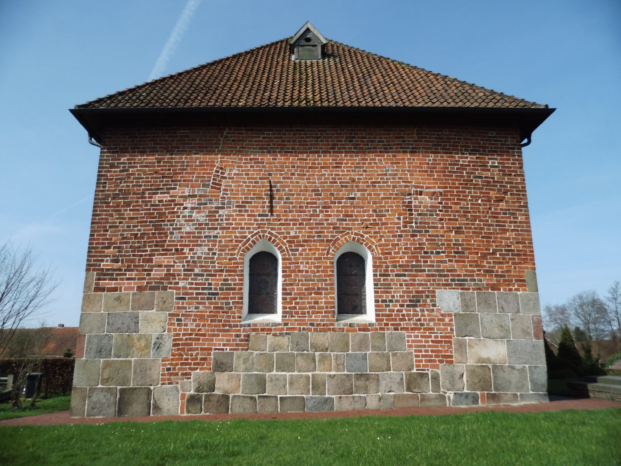 Ostseite der Ardorfer Kirche, Ardorf, Stadtteil der Stadt Wittmund, Landkreis Wittmund, Niedersachsen, Deutschland